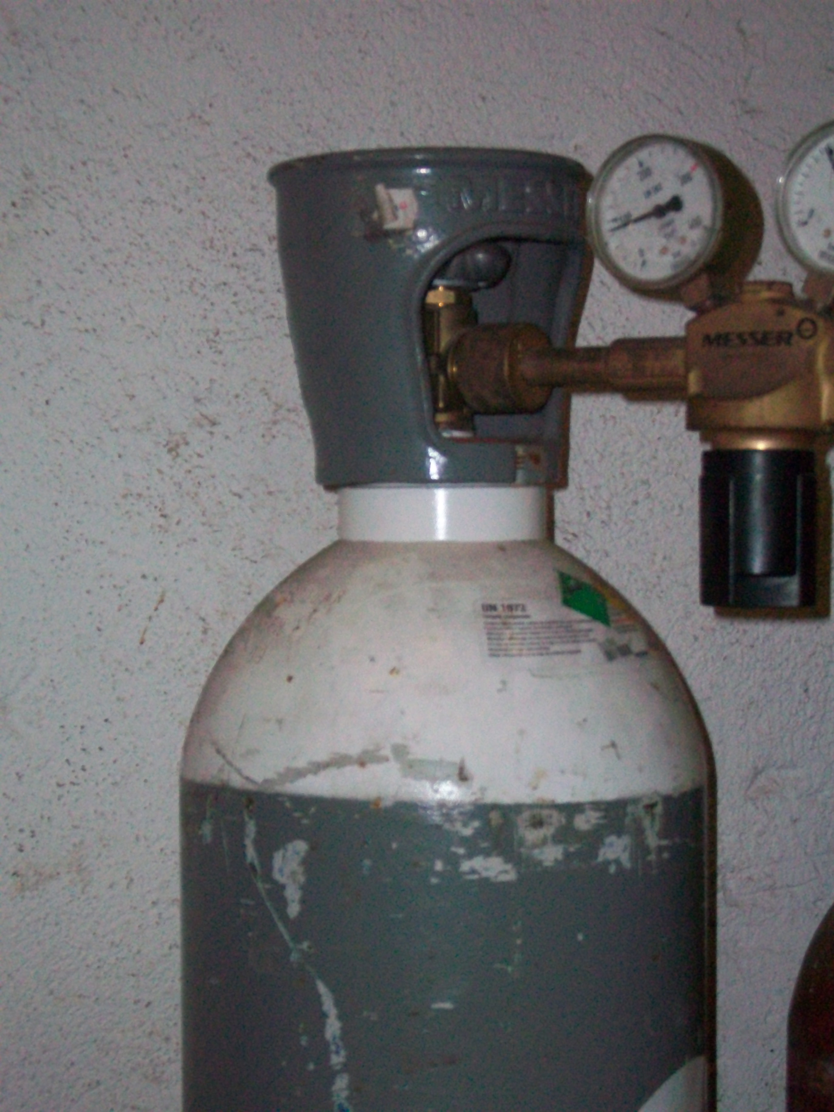 Imagen de una botella de oxigeno